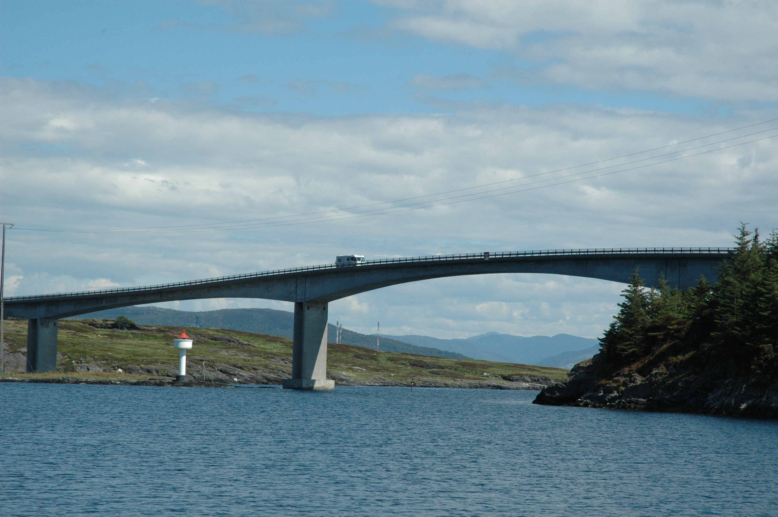 Ognasundbrua, Bokn